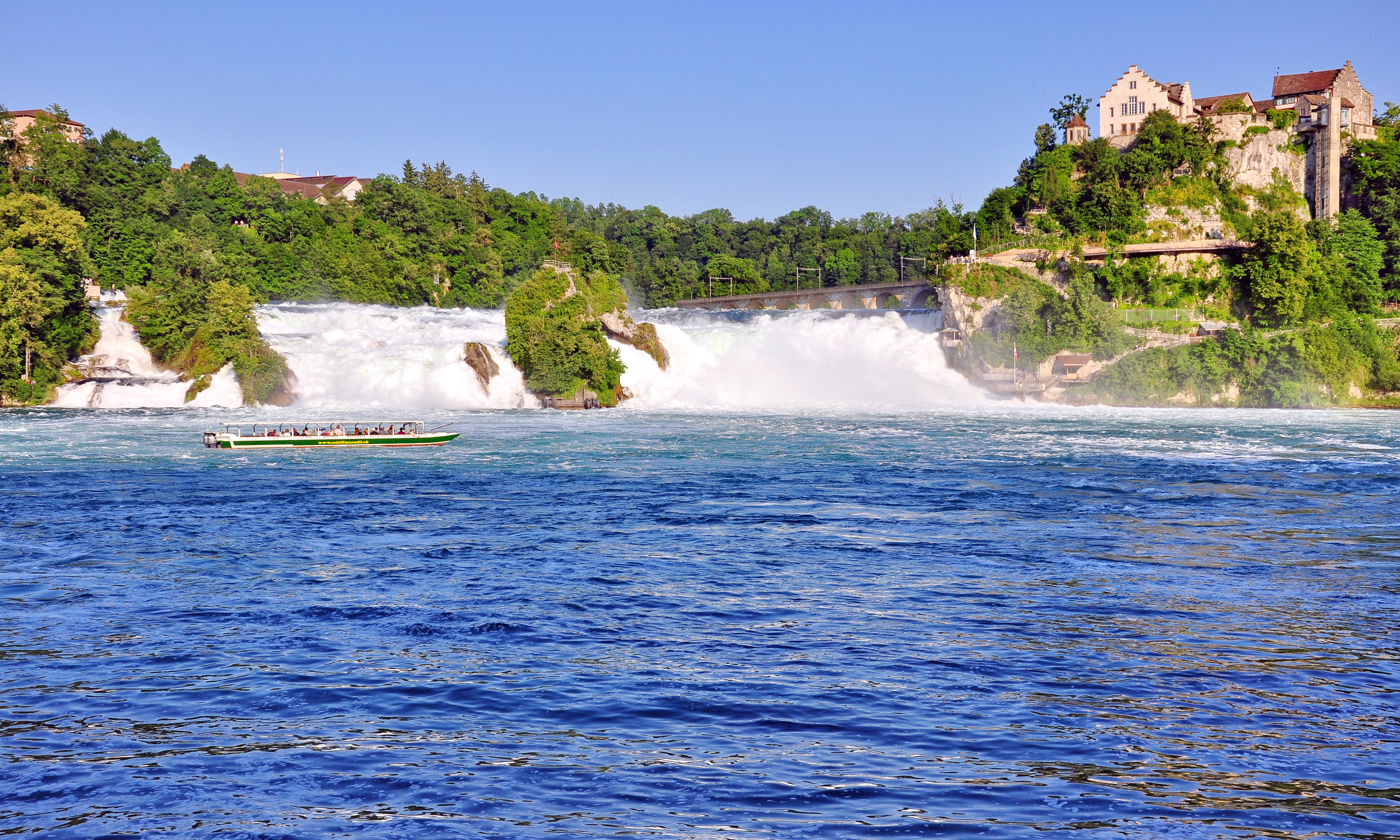 Rheinfall and Schloss Laufen in Laufen-Uhwiesen as seen from Neuhausen am Rheinfall (Switzerland)